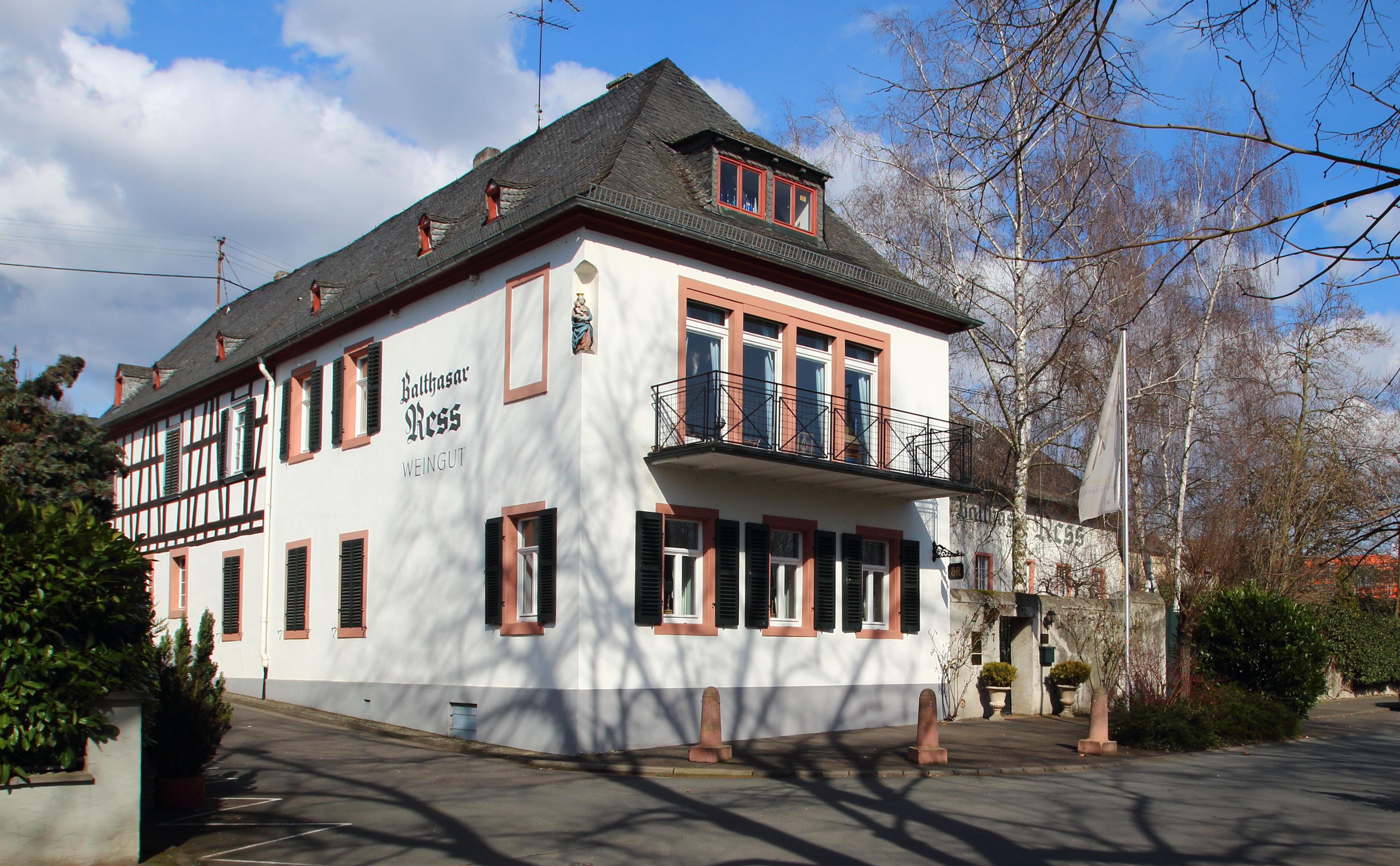 Weingut Balthasar Ress, Hattenheim im Rheingau, Hessen.